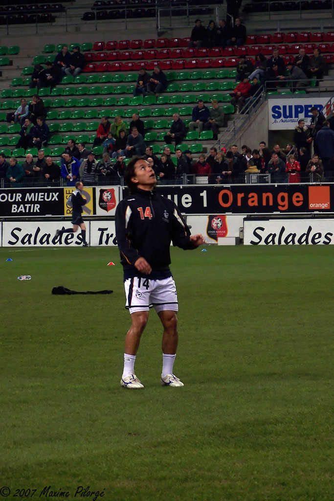 Match de Foot Rennes - Lorient, 23 Février 2008, Ligue 1 Saison 2007-2008